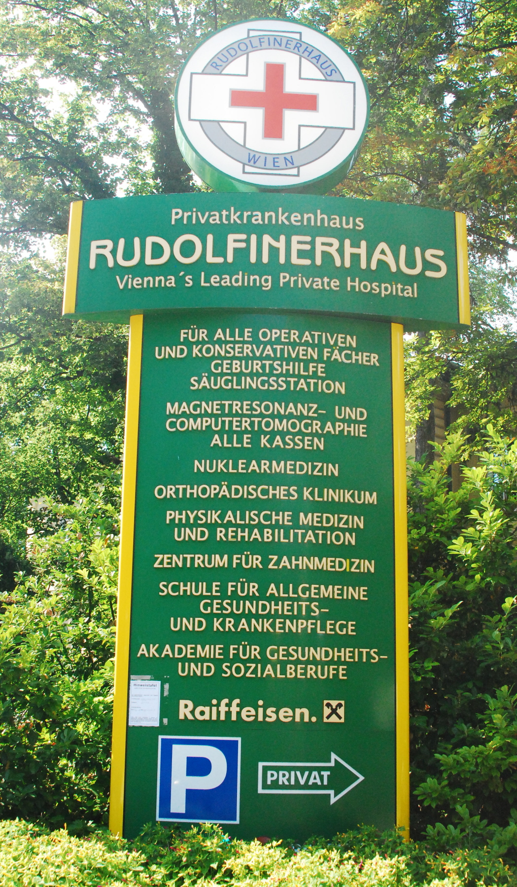 Tafel des Krankenhauses Rudolfinerhaus in Wien-Döbling